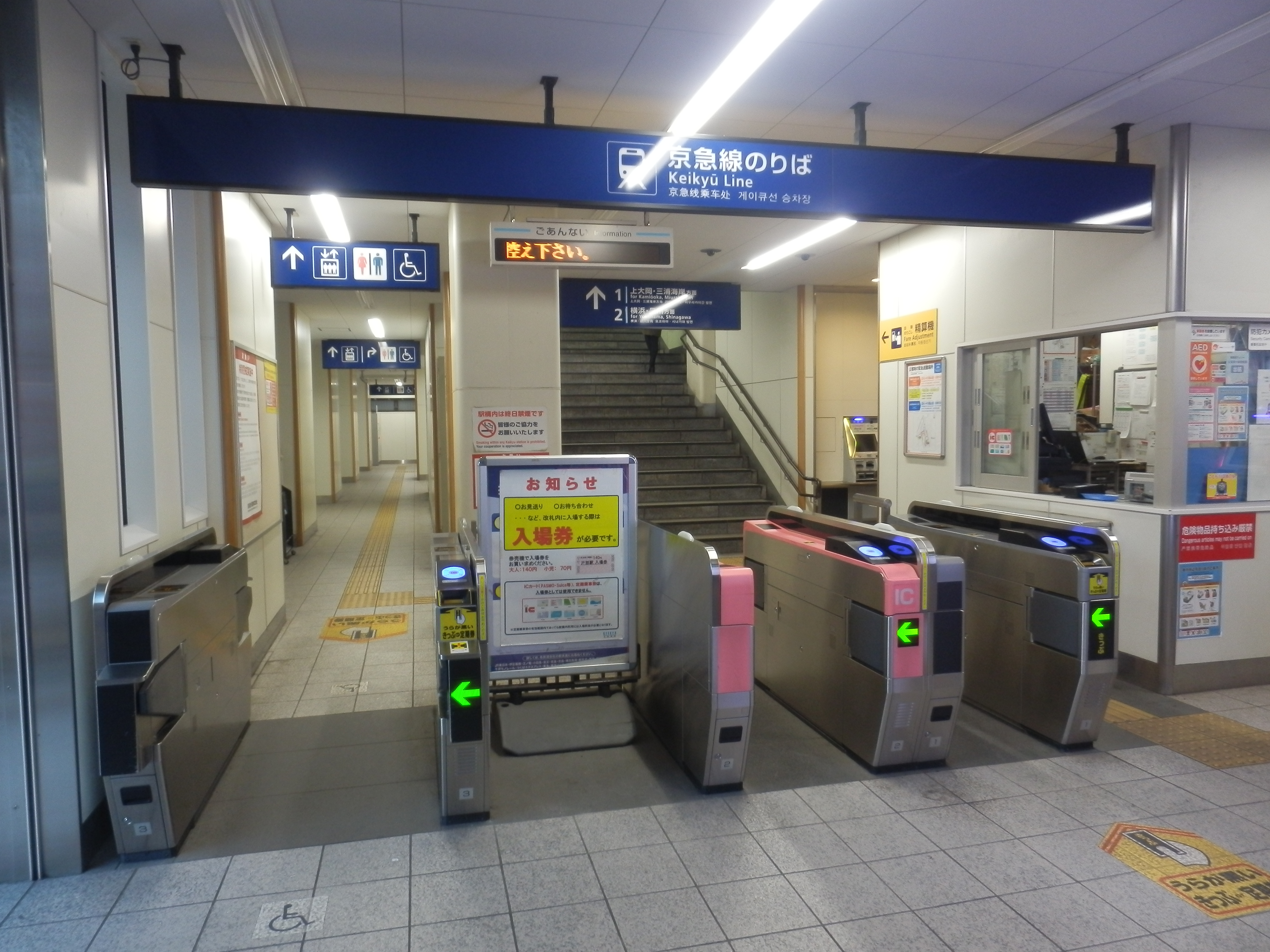 戸部駅改装後の改札口付近（2018年3月）